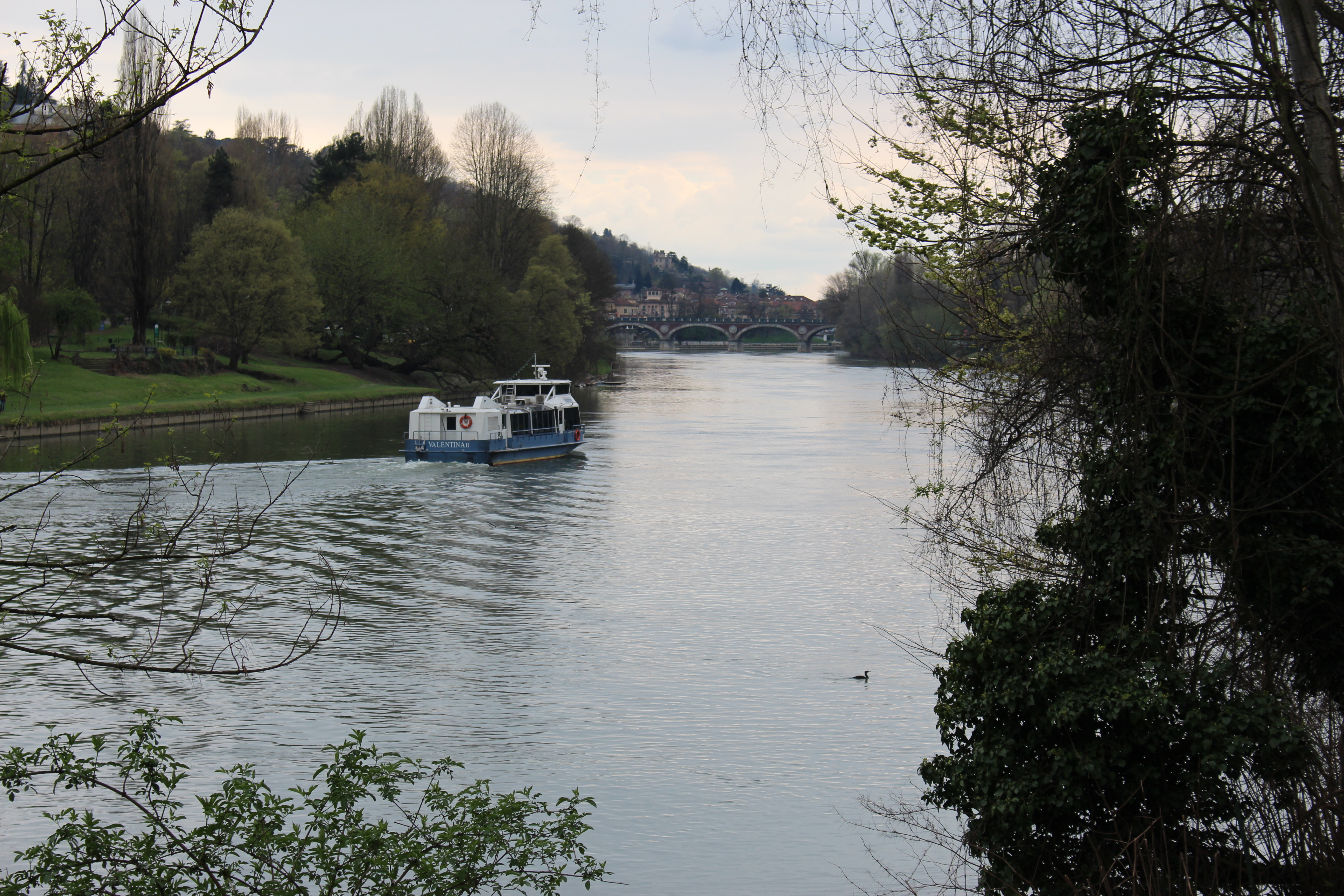 Il Po a Torino